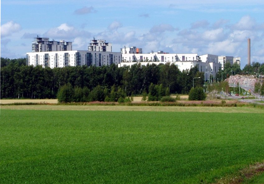 Viikinmäen kerrostaloja Viikin peltoalueelta kuvattuna.